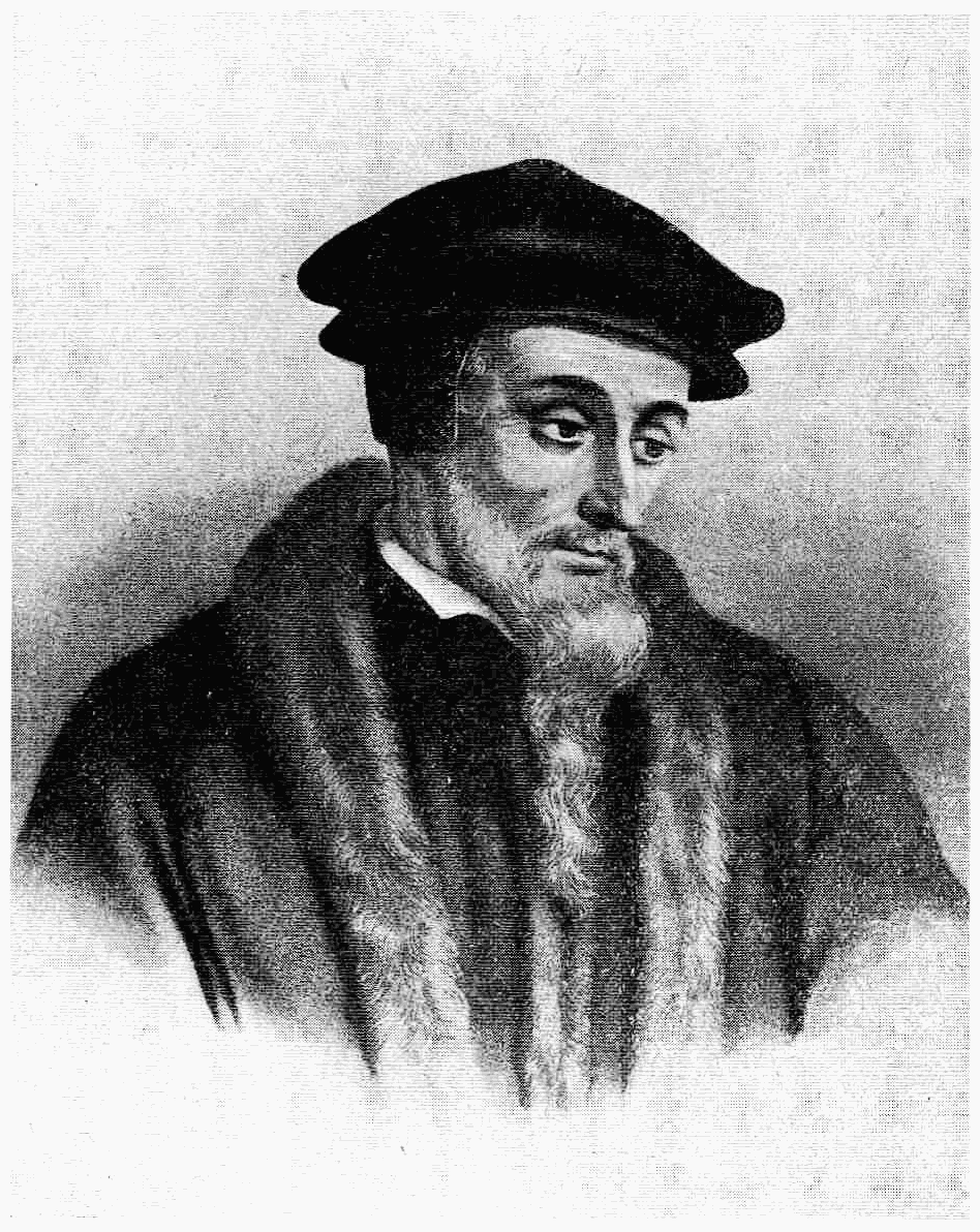 Jean Calvin